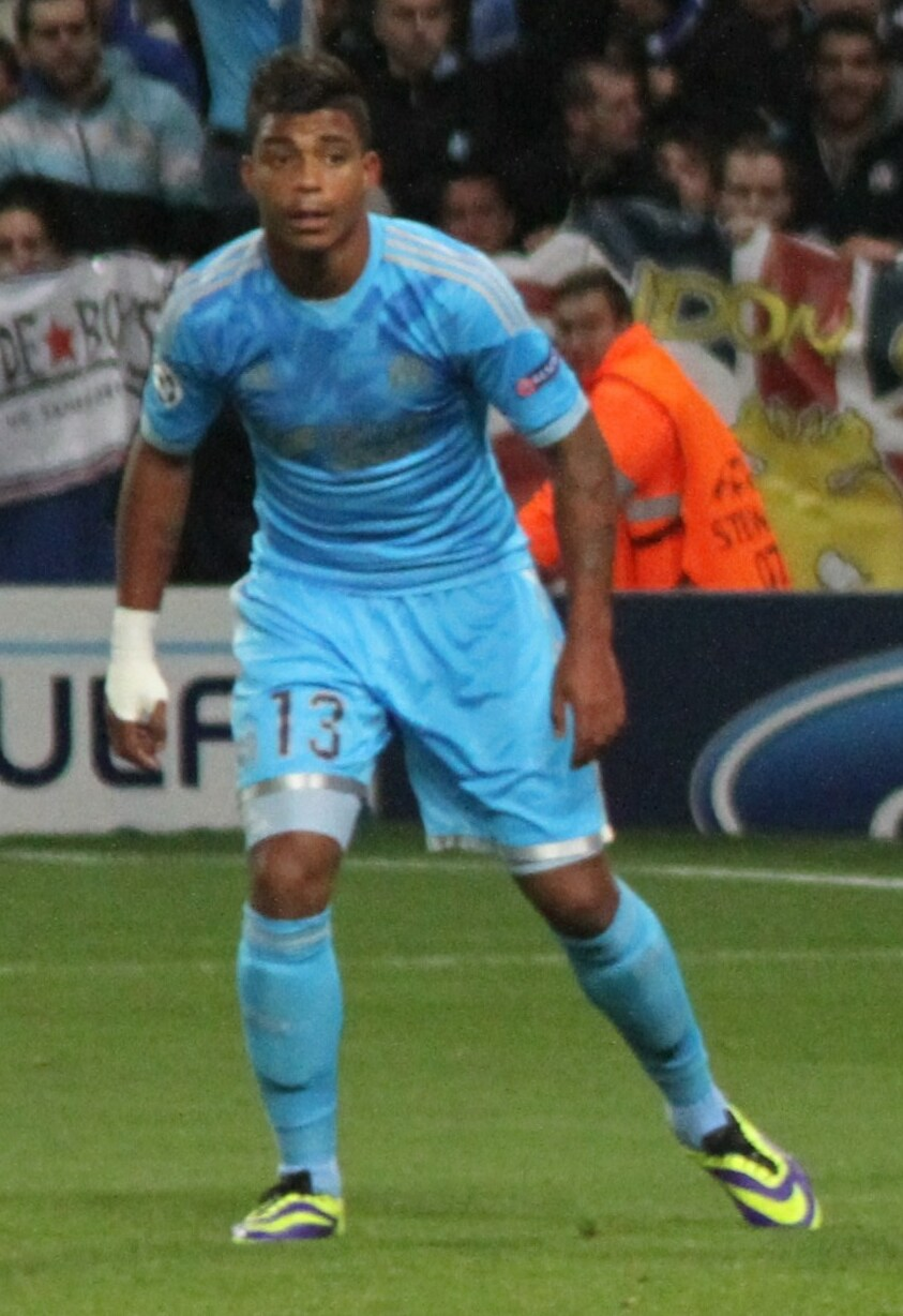 Mario Lemina lors d'Arsenal - OM en Ligue des champions 2013-2014.